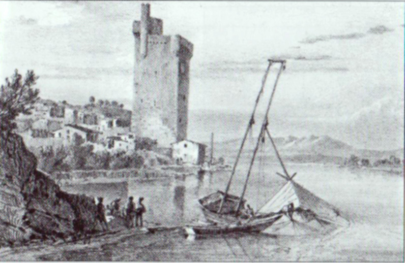 Pêche au carrelet gravure du XVIIe siècle